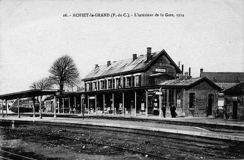 La gare d'Achiet en 1914 avant les destructions.